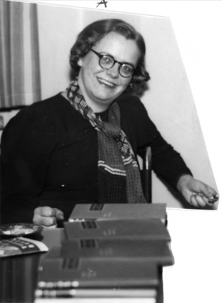 portrett, kvinne, psykiater, sittende halvfigur.